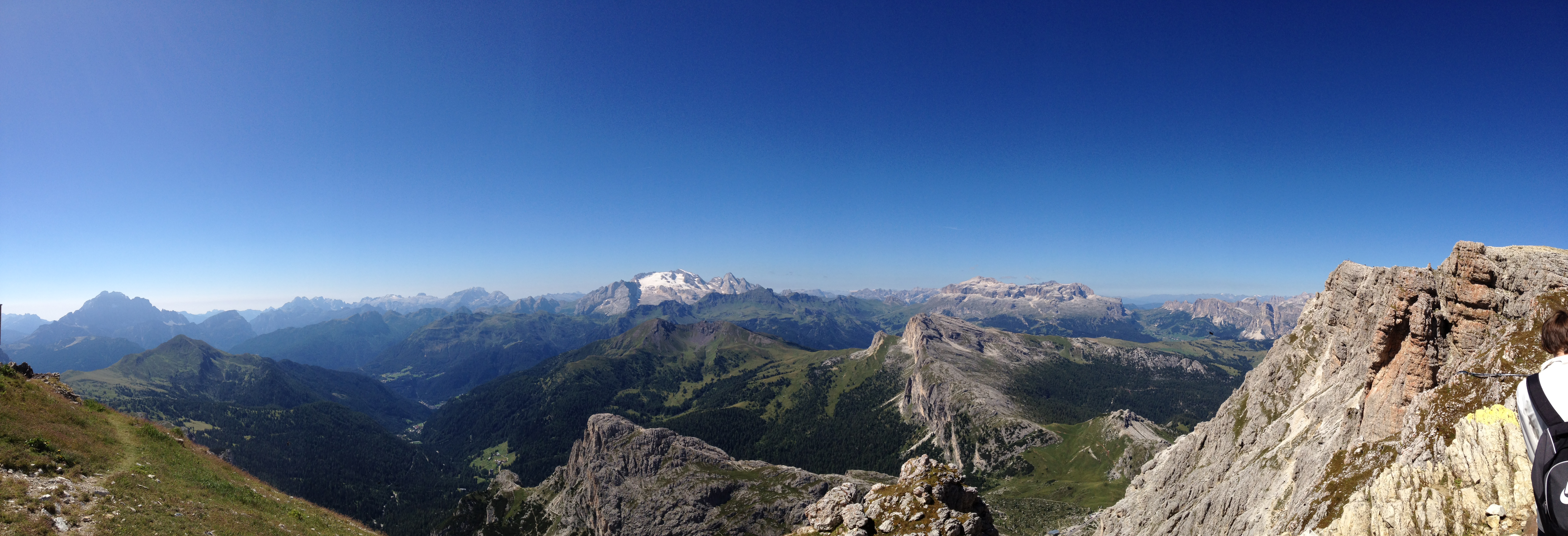 Panorama delle Dolomiti da Lagazuoi